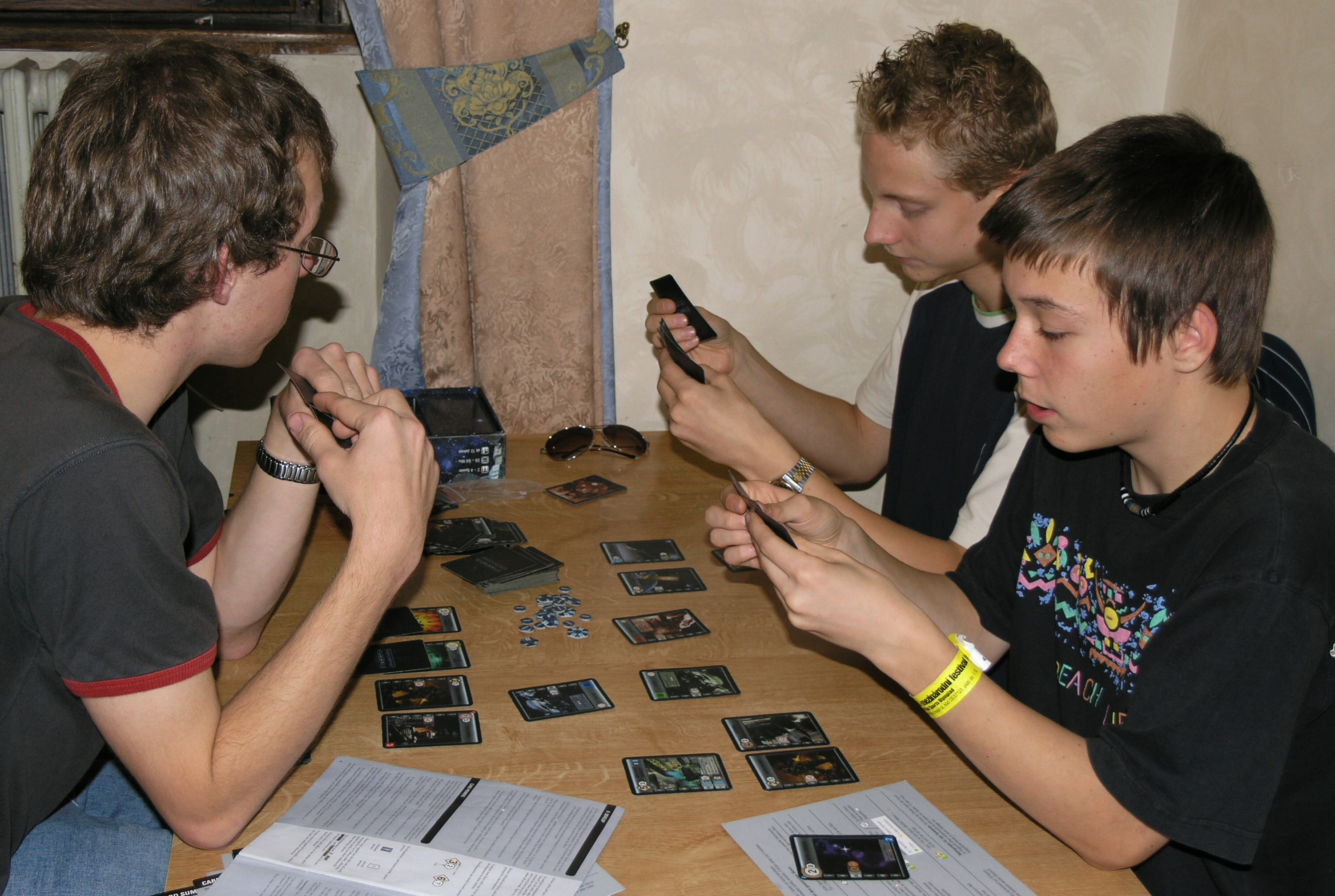 Česky: Deskohraní 2008